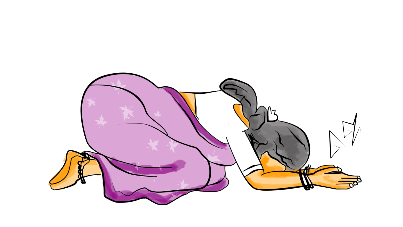 பஞ்சாங்க நமசுகாரம் - பெண் தன்னுடைய ஐந்து அங்கங்களை தரையில் படும்படி வணங்குதல்